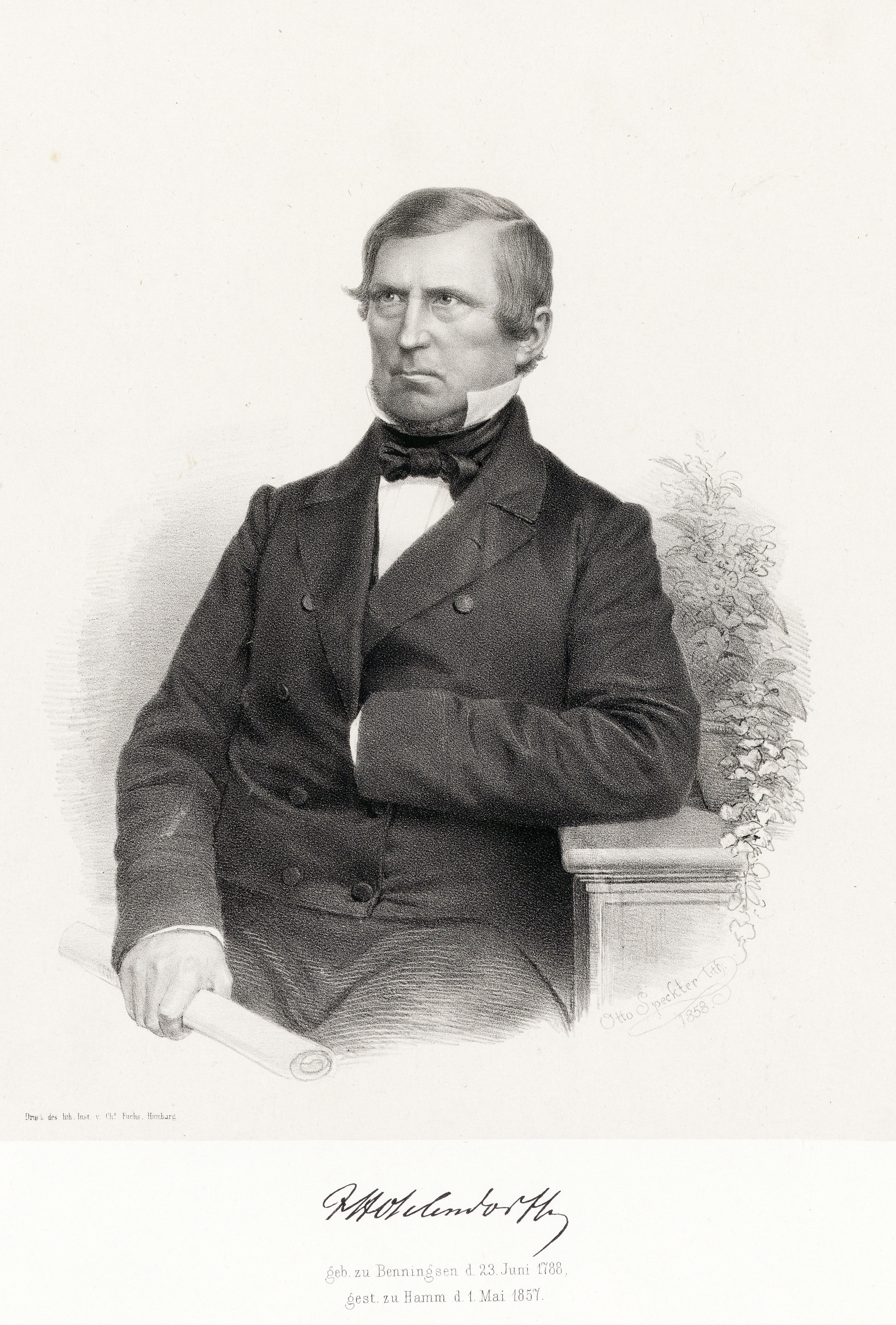 J H Ohlendorff